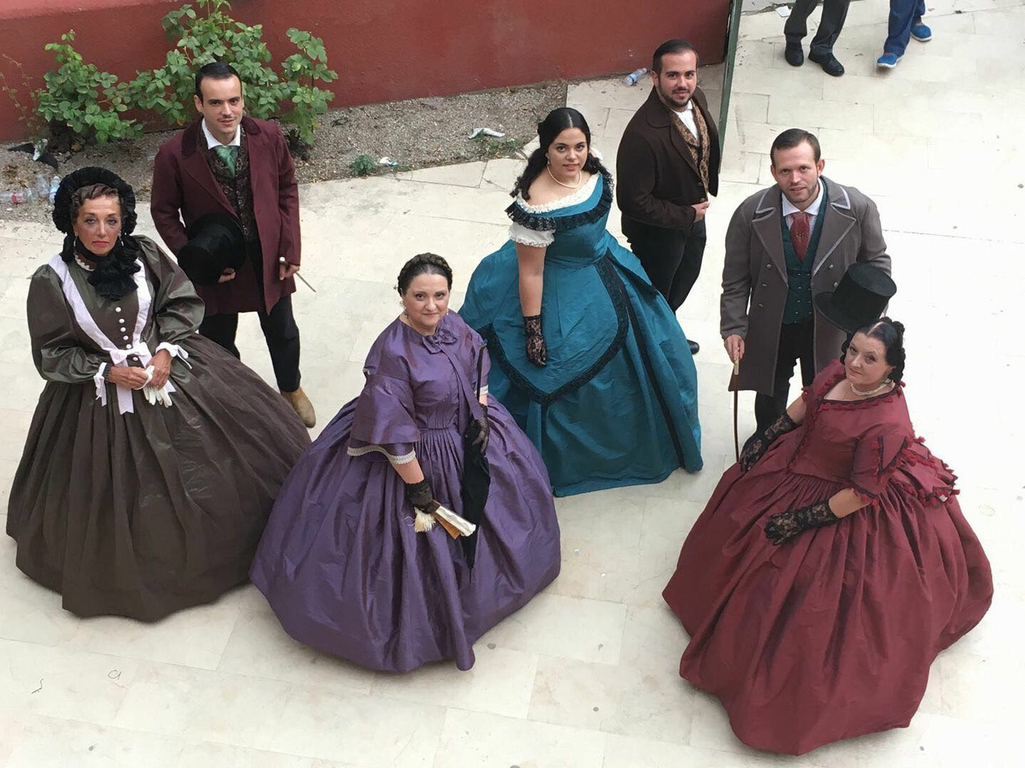 Durante el discurso de mantenedor de la Reina Central de la LXX Fiesta de la Vendimia, D. Fermín Pardo Pardo hizo un recorrido por los bailes de cuentas que han pervivido en Requena, entre el que se encuentra el baile de "Los Lanceros Nuevos", que interpretaron miembros de la Asociación Cantares Viejos ataviados con indumentaria fielmente reproducida de modelos antiguos. Tal como describe Fermín Pardo en el libreto que acompaña el disco "A bailar más que un chompo" (2010) [...] Dentro de los bailes de cuentas conservados en Requena, el único que fue siempre de salón o de maestro y no popular fue el conocido como los lanceros, practicado por las clases bienestantes de la ciudad, correspondientes a comerciantes y terratenientes. Mantuvo su vigencia desde la segunda mitad del siglo XIX hasta el primer tercio del XX. Los lanceros es una especie de rigodón francés que consta de cinco partes distintas, a manera de contradanza. Son cinco composiciones coreográficas o figuras diferentes que se mueven al son de cinco melodías también diferentes. En 1994, Marcial García Ballesteros encontró, dentro del archivo del musico compositor requenense Mariano Pérez Sánchez, el conjunto de las 15 partituras de los llamados lanceros nuevos de Requena compuestos por Antonio Llorens. Con ocasión del 750 Aniversario de la concesión de la Casta Puebla de Requena y su Tierra por ALfonso X de Castilla, se realizó un trabajo de recuperación de Los Lanceros por parte de tres agrupaciones: El Grupo de Danzas "El Bolero" de l'Alcúdia que tuvo a cargo la restauración y recuperación de los bailes, la Orquesta Filarmónica de Requena que interpretó la música de los lanceros y la Asociación Cantares Viejos de Requena. Este trabajo se dio a conocer en la noche del 3 de agosto de 2007 en el Patio de Armas de la Fortaleza de Requena. This is a photography of a Folklore festival in Spain (Wikidata id Q21003051).